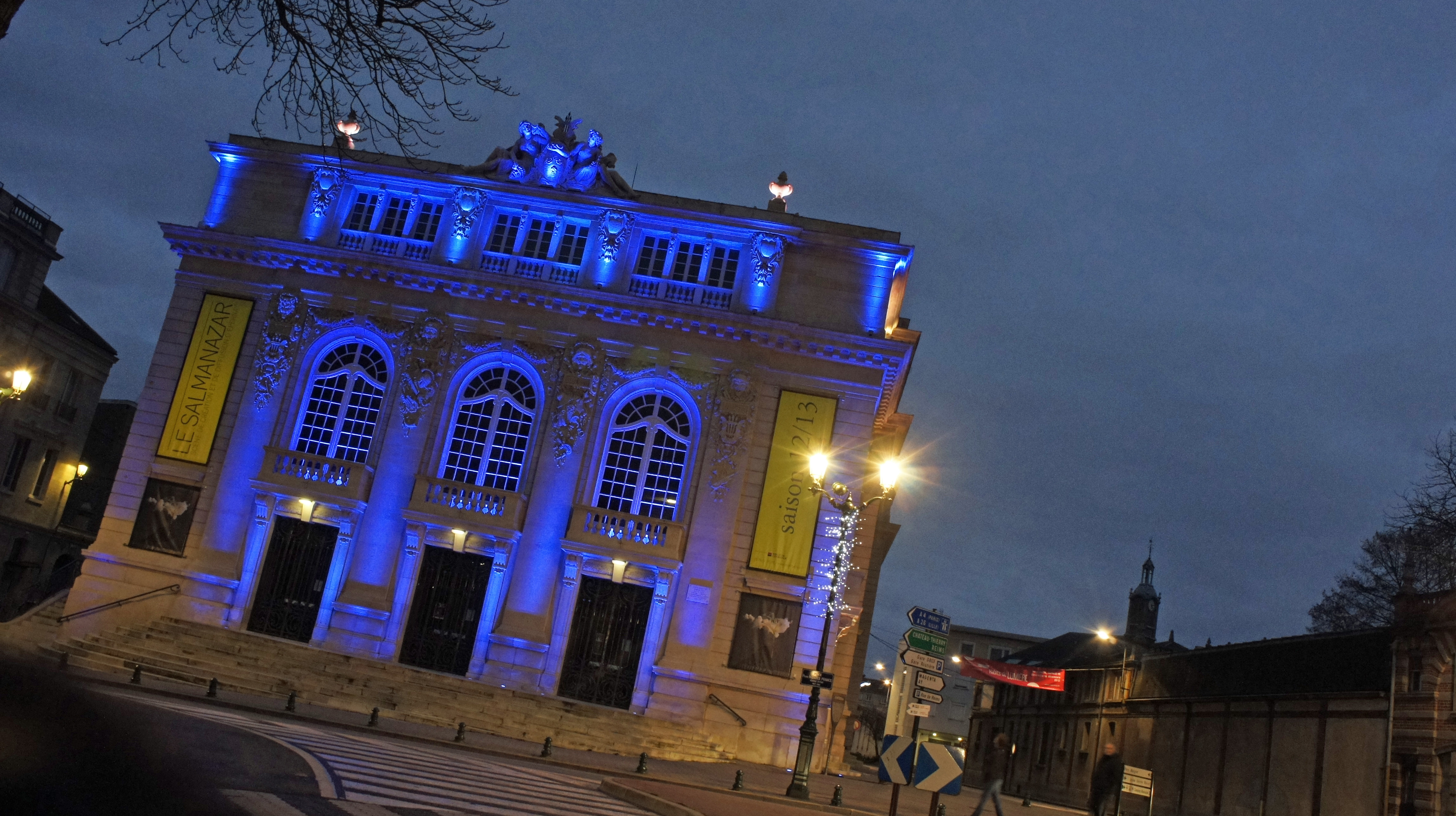 Illumination_de_Noël_2012 du théâtre d'Epernay .